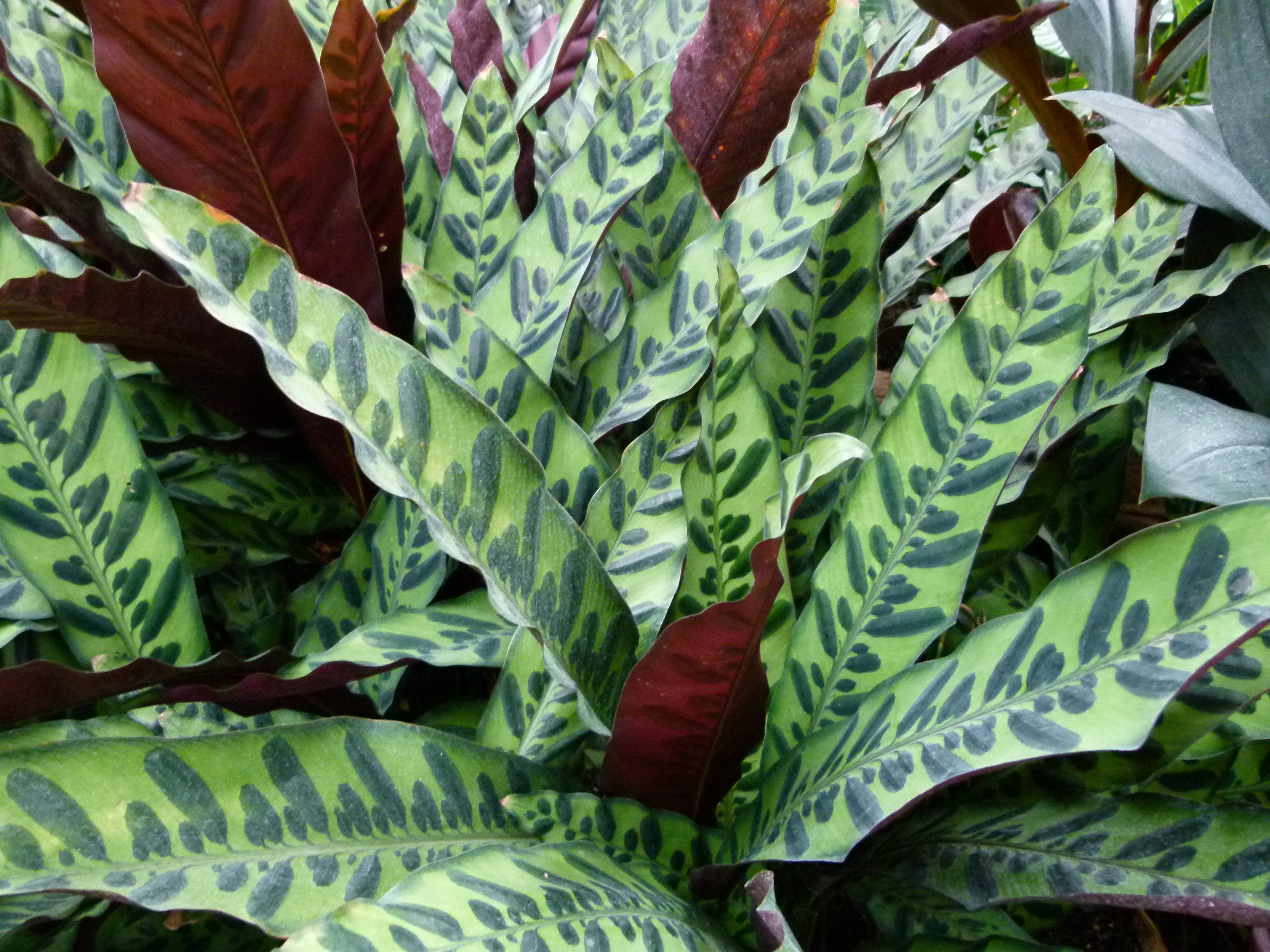 Photos taken summer 2011 in the greenhouse of the park Planten un Blomen in Hamburg. This park used to be the botanical garden of the city. Fotos sind von Sommer 2011 in dem Gewächshaus von dem Park Planten un Blomen von Hamburg genommen worden. Dieser Park war früher der botanische Garten. Photos prises l'été 2011 dans les serres du Parc Planten un Blomen de Hambourg. Ce parc était autrefois le jardin botanique de la ville.